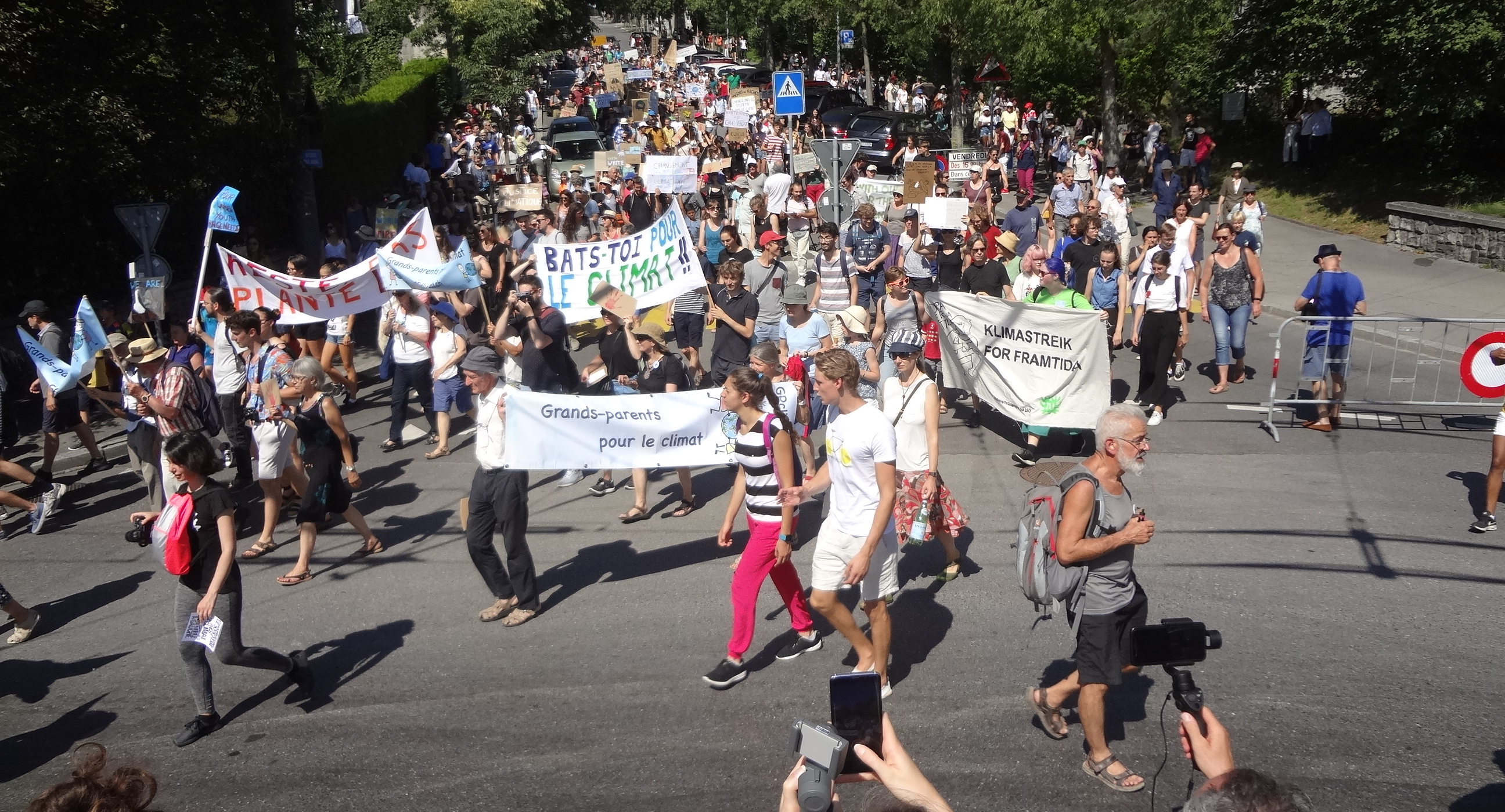 Manifestation pour le climat, Lausanne. Dernier jour de la rencontre du mouvement Fridays for Future (vendredis pour l'avenir) réunissant des membres de plus de 37 pays lors du Summer Meeting in Lausanne Europe, ou SMILE for Future 5-9 août 2019. Bas de l'avenue des Bains, arrivée sur l'avenue de Rhodanie.